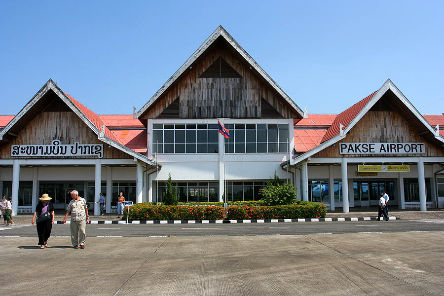 Pakxe (Pakse) Airport, Laos.